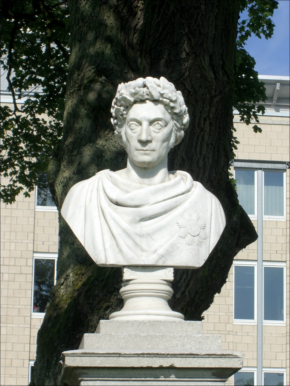 (Groß-)Herzog karl von Mecklenburg-Strelitz in Neustrelitz